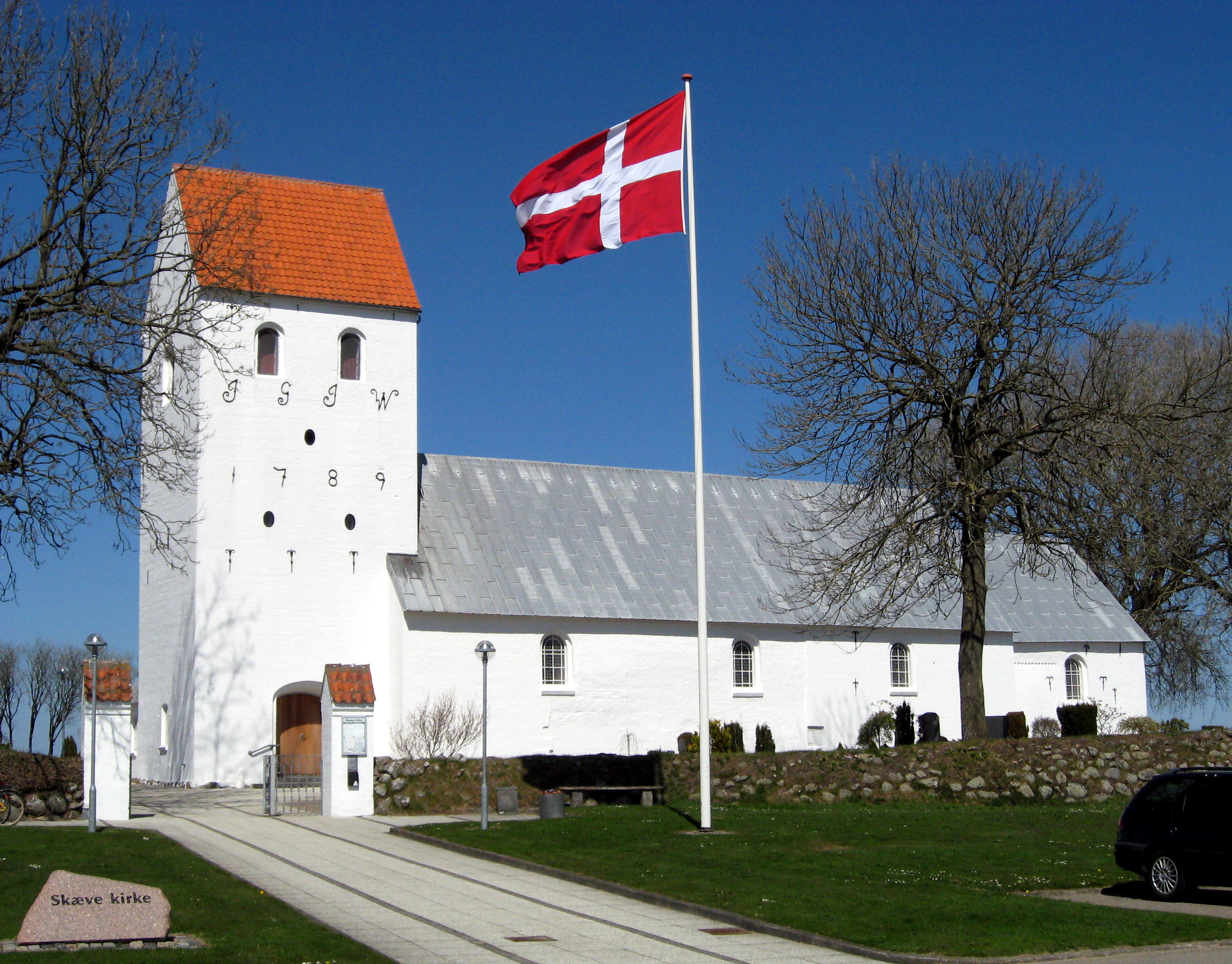 Skæve Kirke, Frederikshavn Kommune